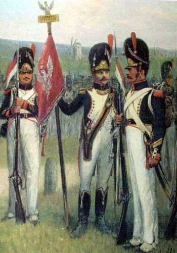 Oficer sztandarowy i podoficerowie 5 pułku piechoty Księstwa Warszawskiego w bermycach. autor: mzopw zdjęcie obrazu J. Chełmińskiego.